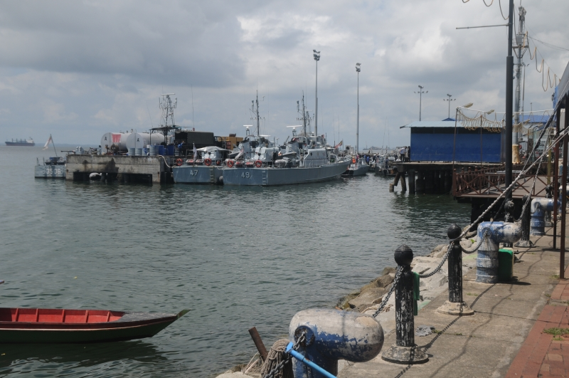 Pelabuhan Sandakan.